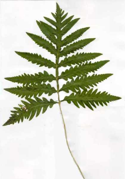 Onoclea sensibilis